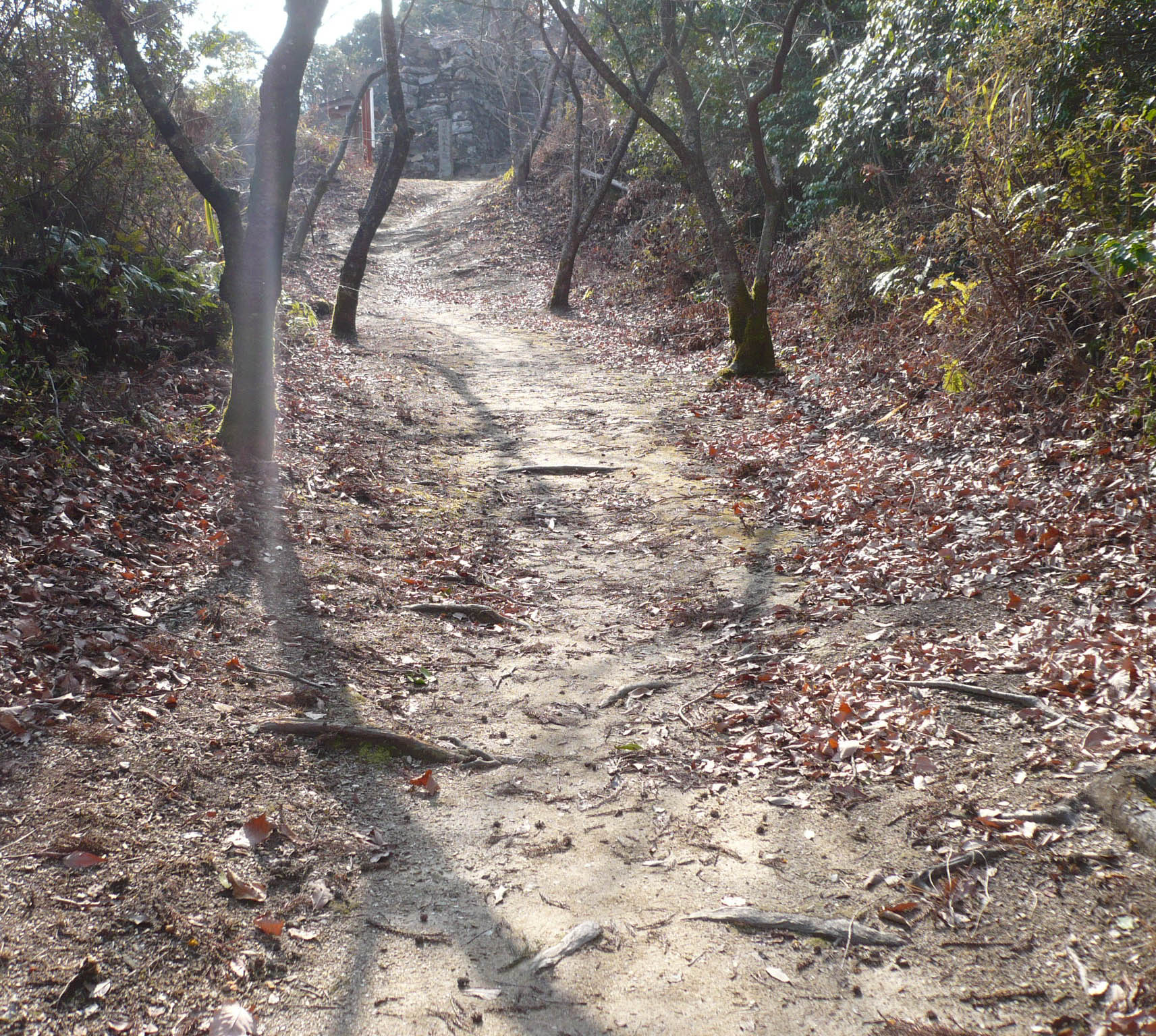 帯曲輪跡